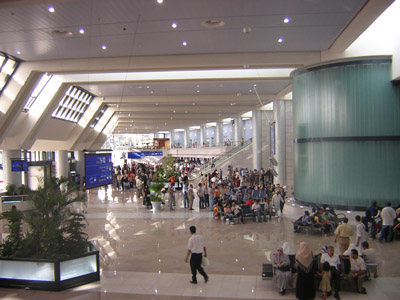 nouveau terminal de l'aeroport d'Alger